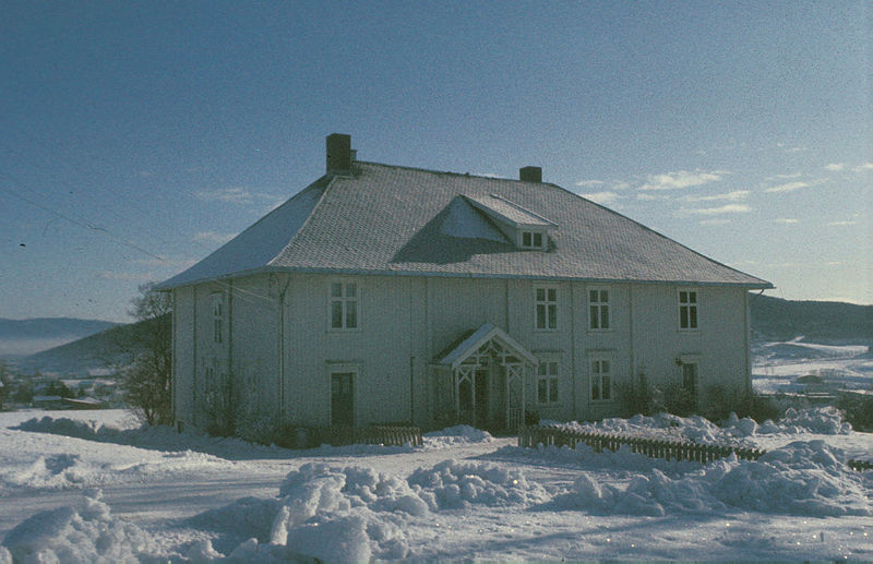 Bø prestegård i Telemark. Foto: Ina Backer/Riksantikvaren.